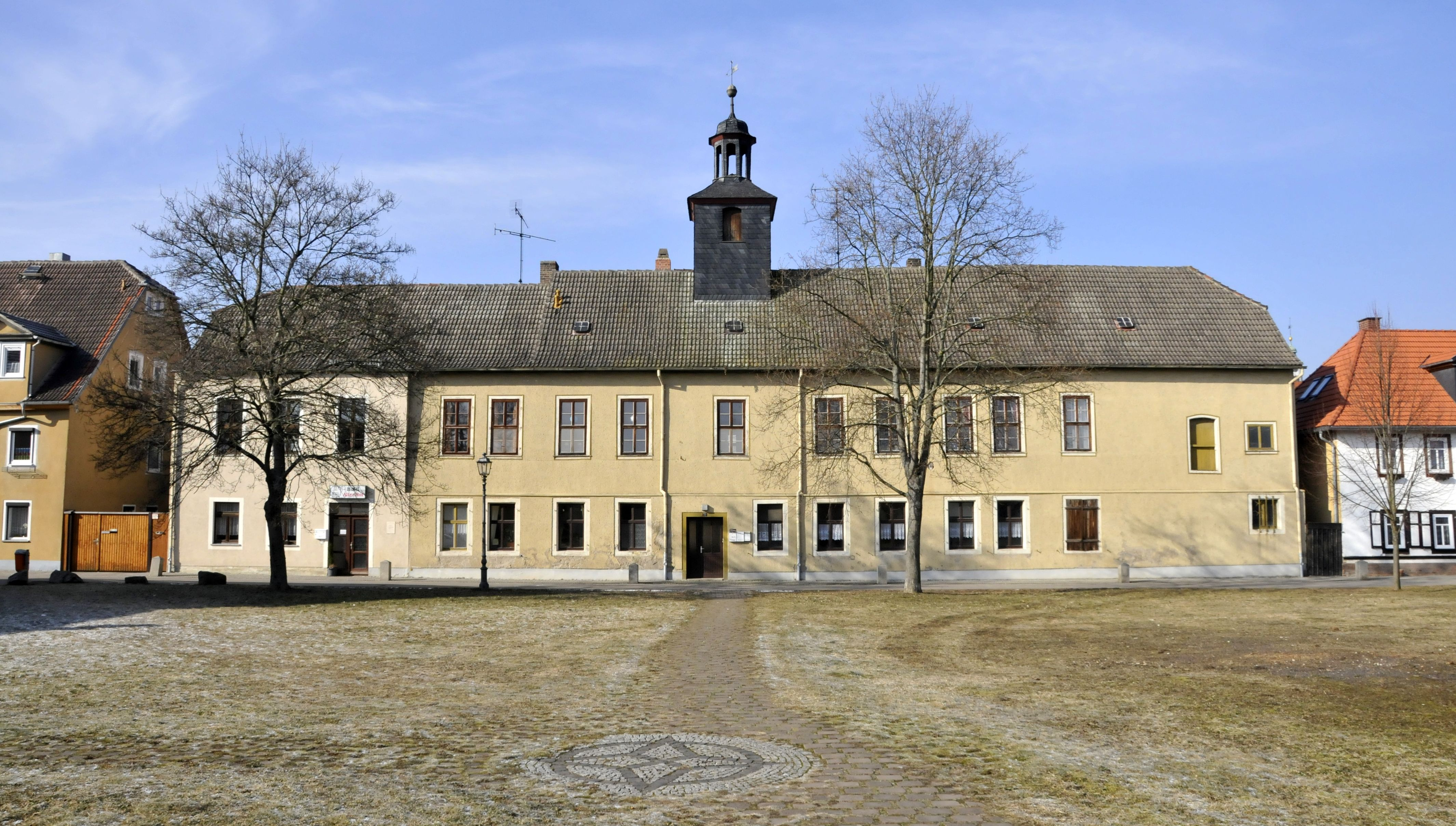 Neudietendorf, Altenhof